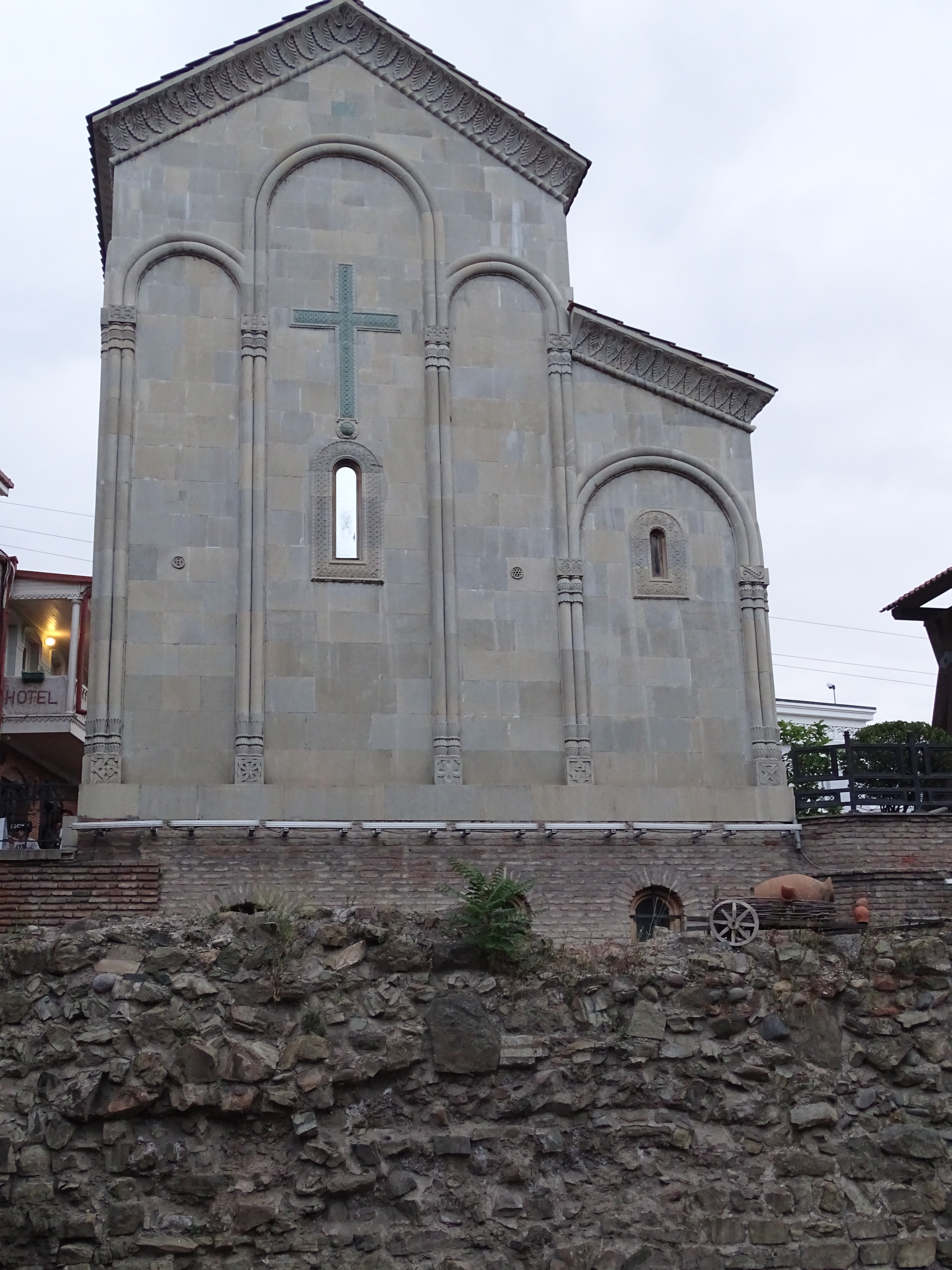 Kirche der 40 Märtyrer, Tiflis. Die Kirche erinnert an die Vierzig Märtyrer von Sebaste